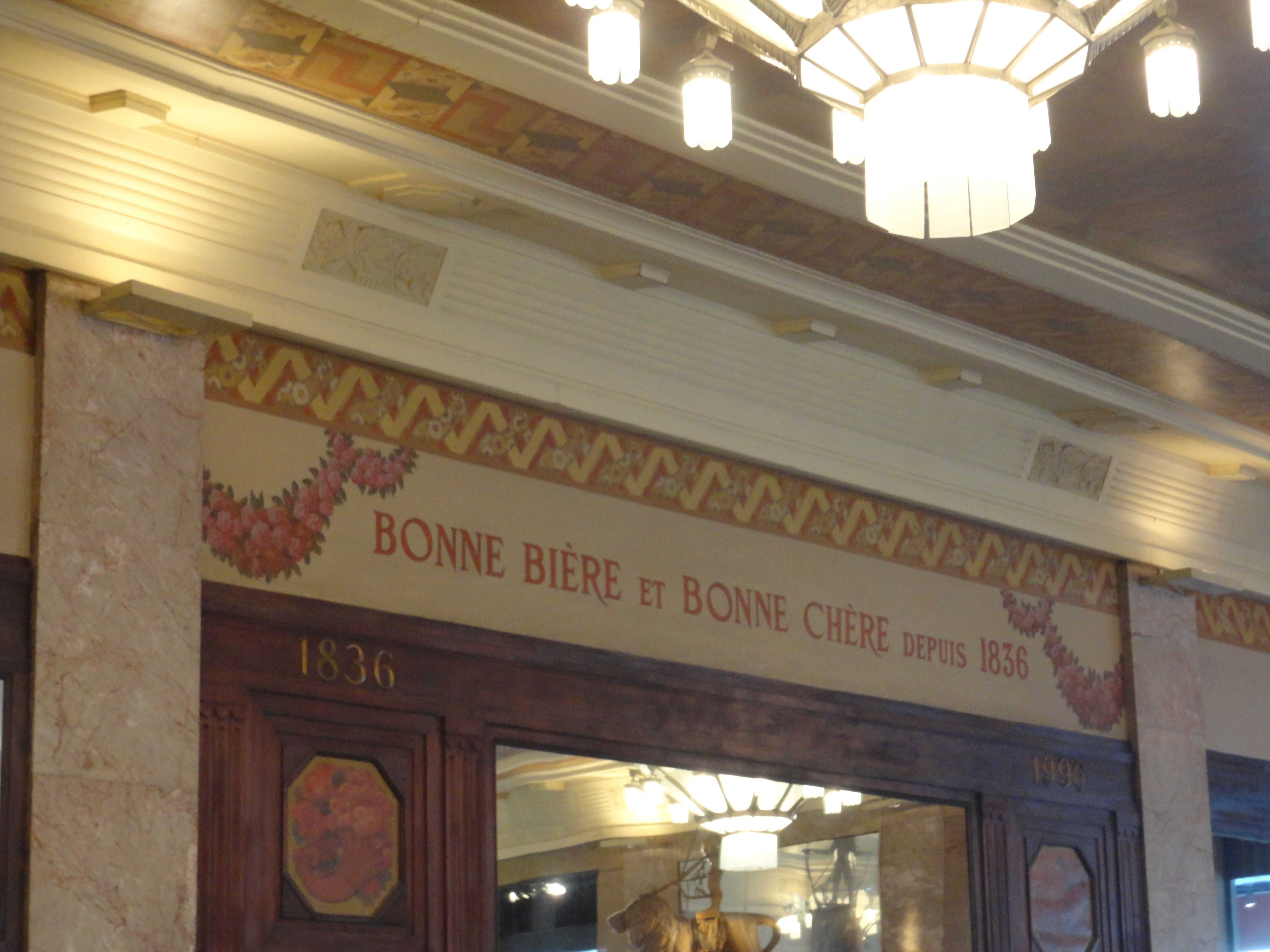 Inscription « BONNE BIÈRE ET BONNE CHÈRE DEPUIS 1836 » à l’intérieur de la Brasserie Georges à Lyon (France).